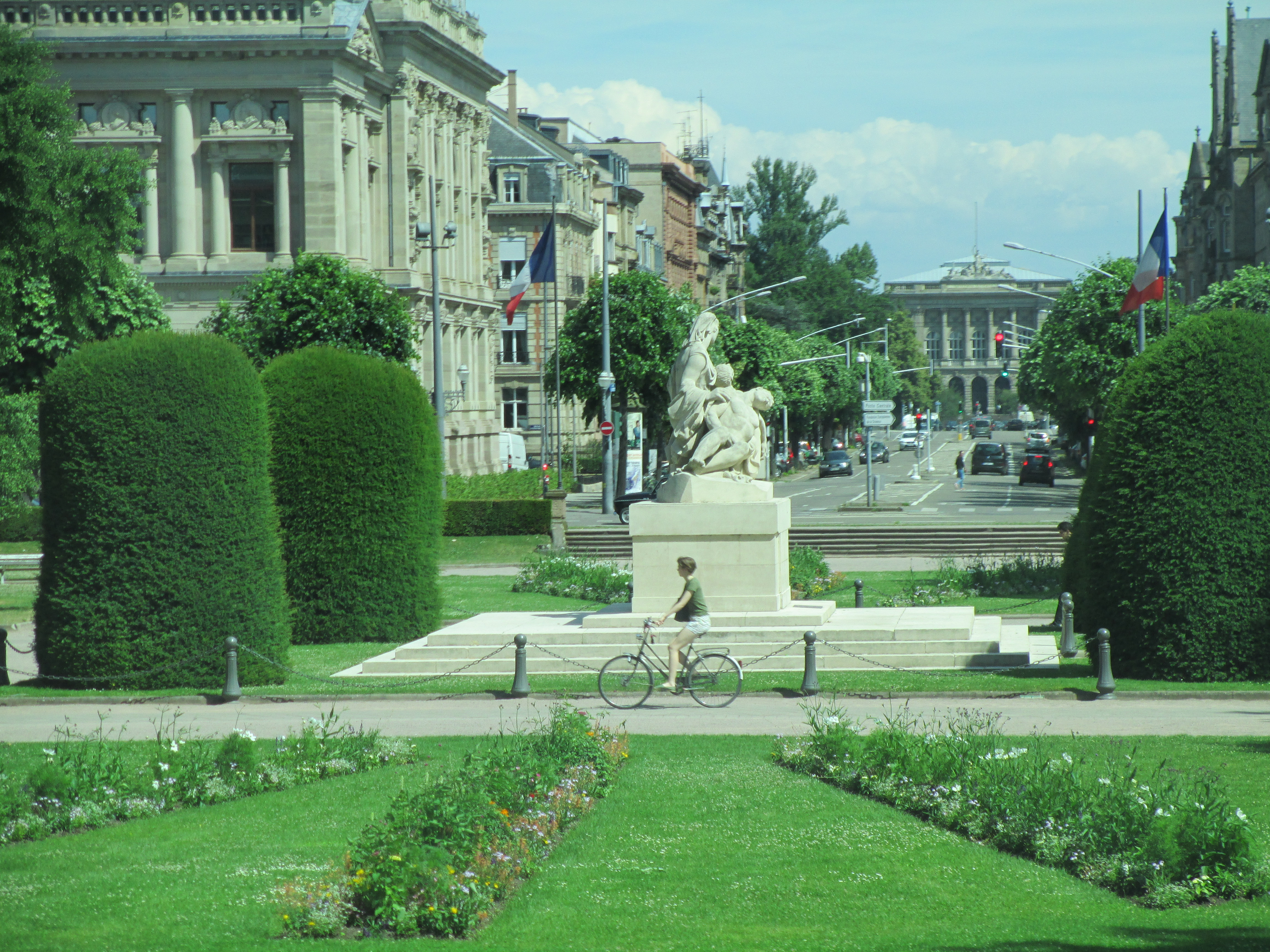 כיכר הרפובליקה בשטרסבורג